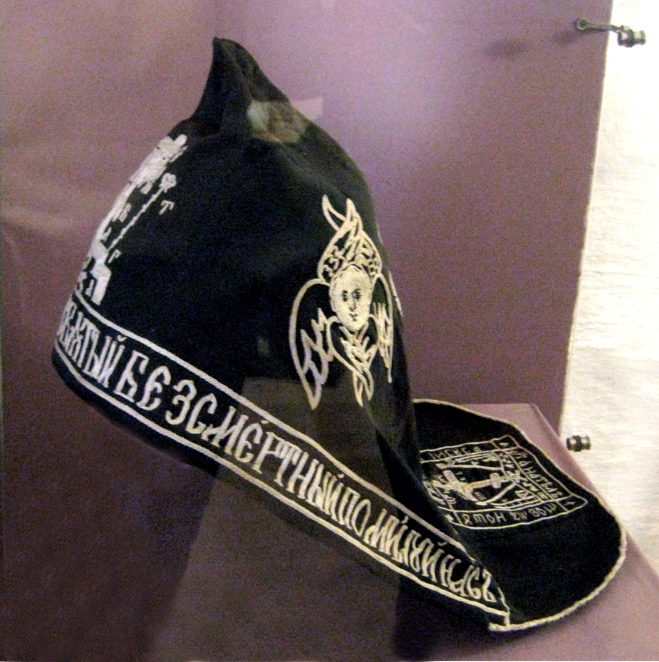 Куколь, 19 век